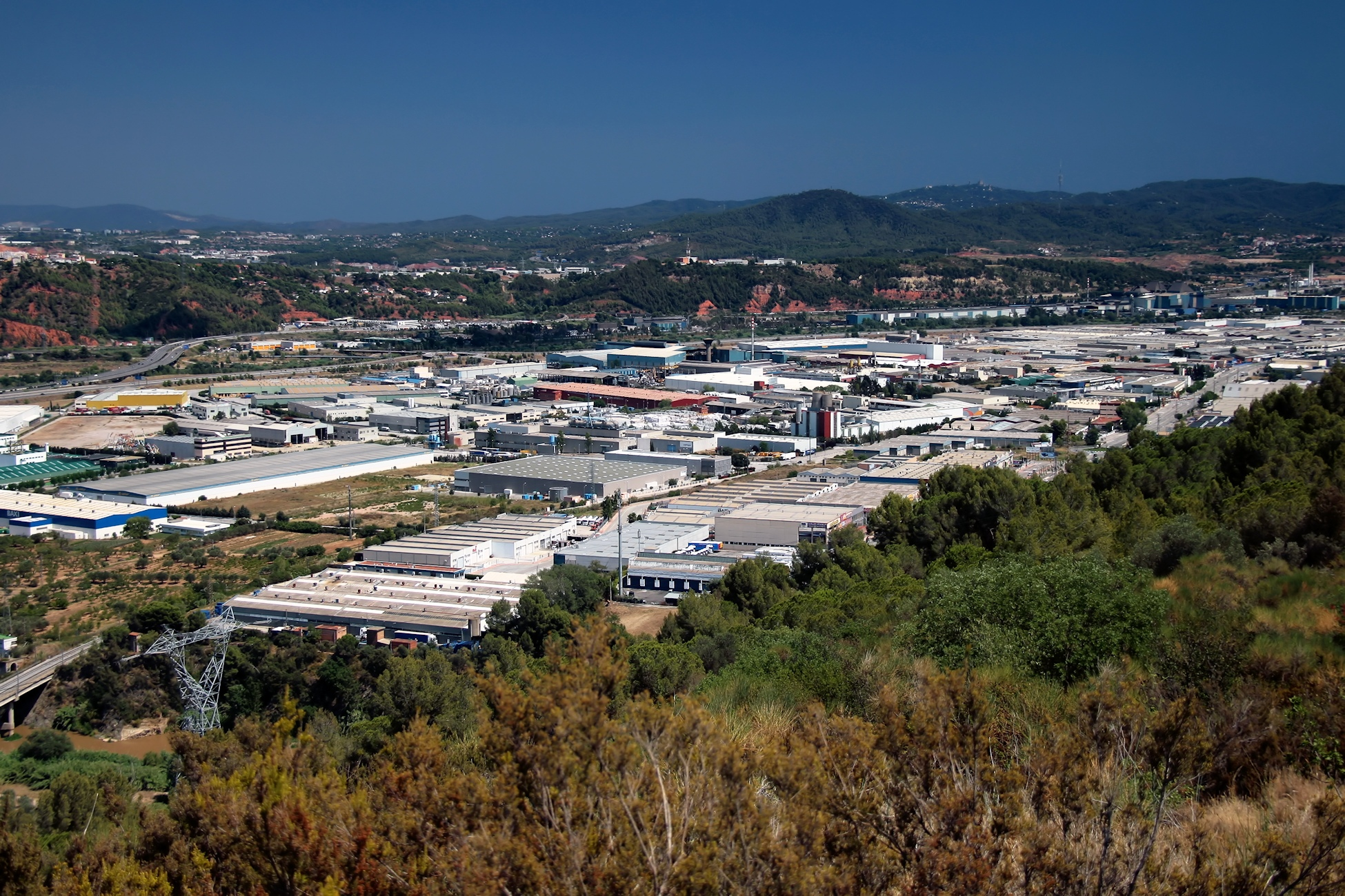 Polígon Industrial Aquiberia